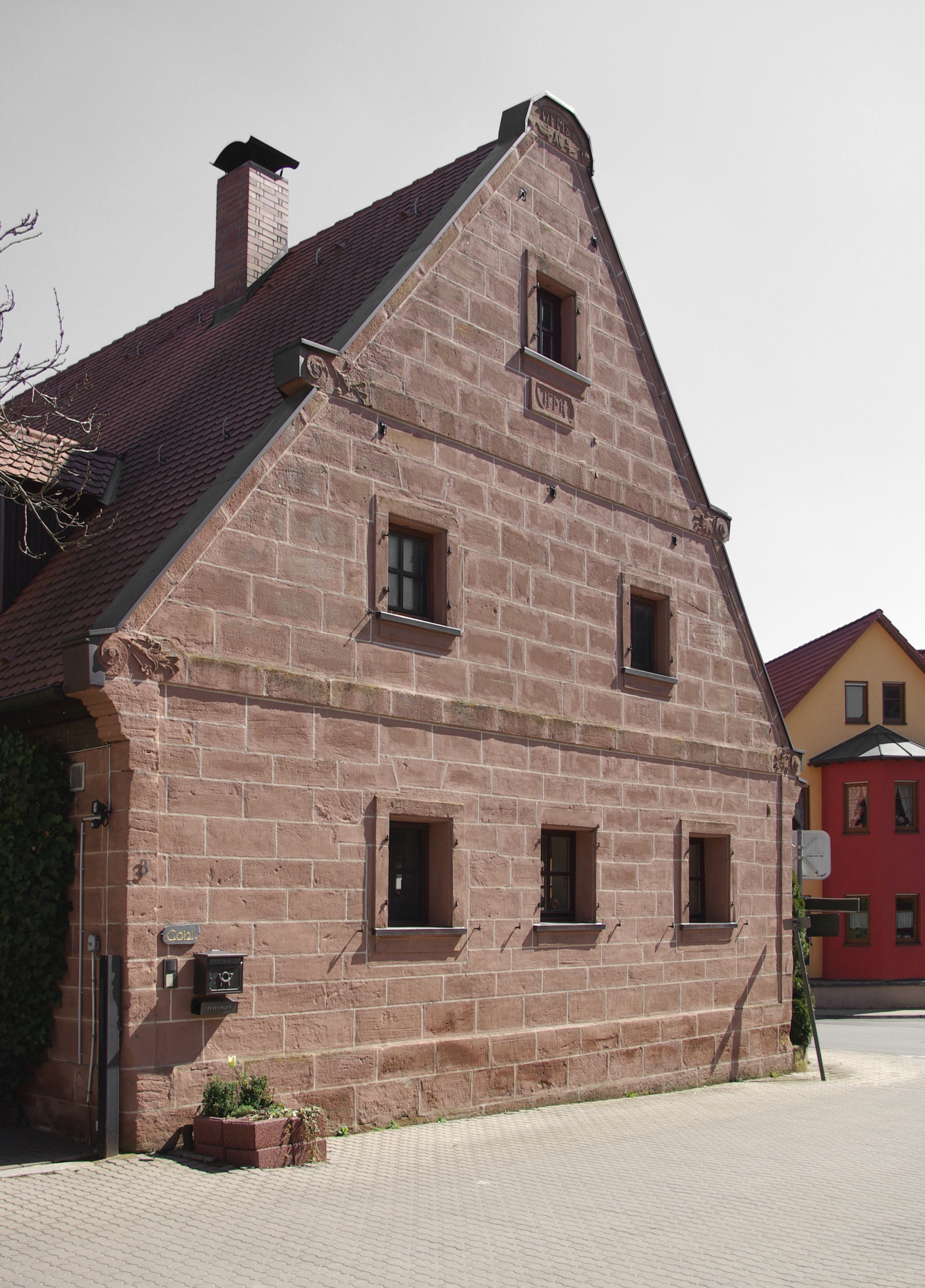 Sandsteinhaus aus dem Jahr 1787 im Erlanger Stadtteil Hüttendorf